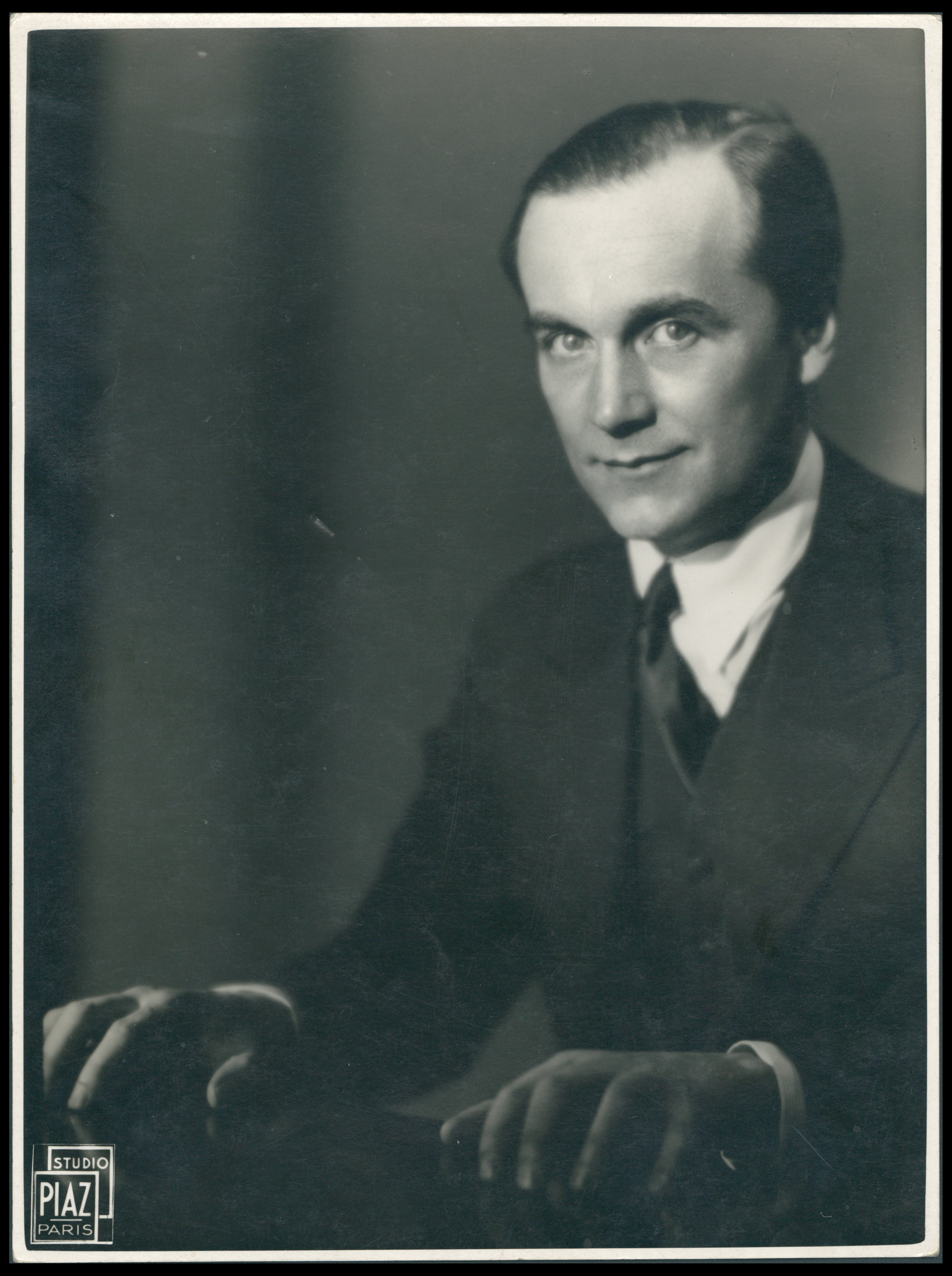 Zygmunt Dygat